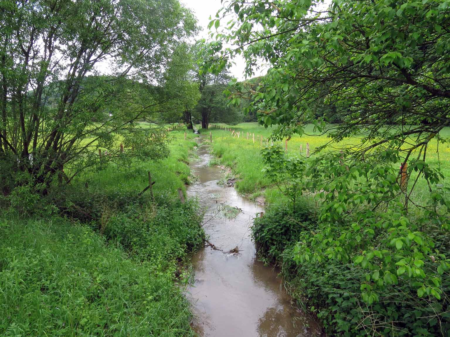 Gewässerrenaturierung Mühlbach nach den Renaturierungsmaßnahmen durch die ÖFM